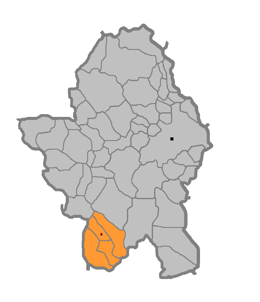 МЗ Стричићи